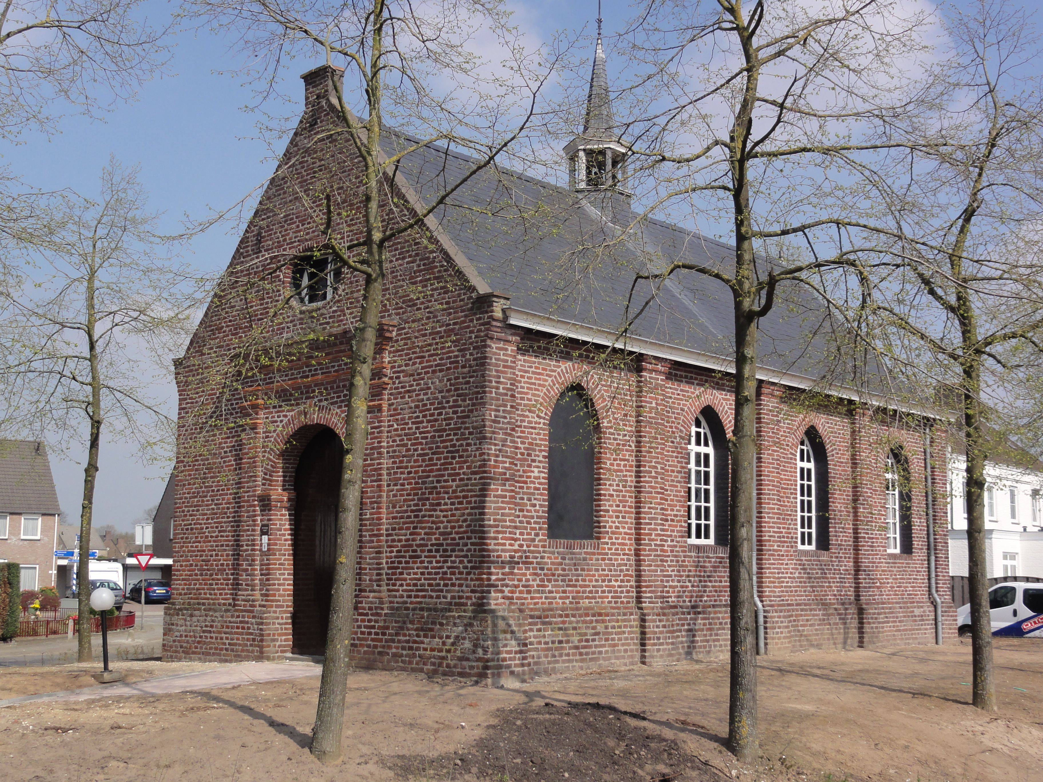 Venray Blitterswijck, Annakapel, Beeteweg